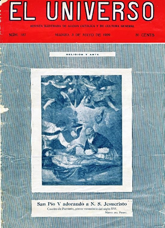 Portada de El Universo, núm. 157